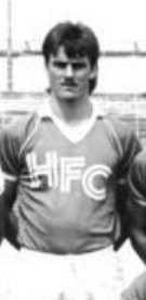 Title: Mannschaftsfoto HFC Chemie Factual corrections and alternative descriptions are encouraged separately from the original description. Additionally errors can be reported at this page to inform the Bundesarchiv. Original historic description: ADN-ZB-Lehmann-4.10.88-tre-Halle: DDR-Fußball-Oberliga. Saison 1988-89. Mannschaft des HFC Chemie. Obere Reihe v.l.: Trainer Karl Trautmann, Andreas Wagenhaus, Martin Trocha, Uwe Machold, Torsten Häußler, Gisbert Pennecke, Jan Rziha, Lutz Weidner, Gert Brauer, Steffen Karl, Ass.-Trainer Bernd Donau; mittlere Reihe v.l.: Lutz Radtke, Uwe Lorenz, Jens Helling, Darusz Wosz, Lutz Schülbe, Torsten Raspe; untere Reihe v.l.: Dietmar Schütze, Frank Wiermann, Karsten Härtel, Jens Adler, Dirk Wüllbier und Rene Tretschok.